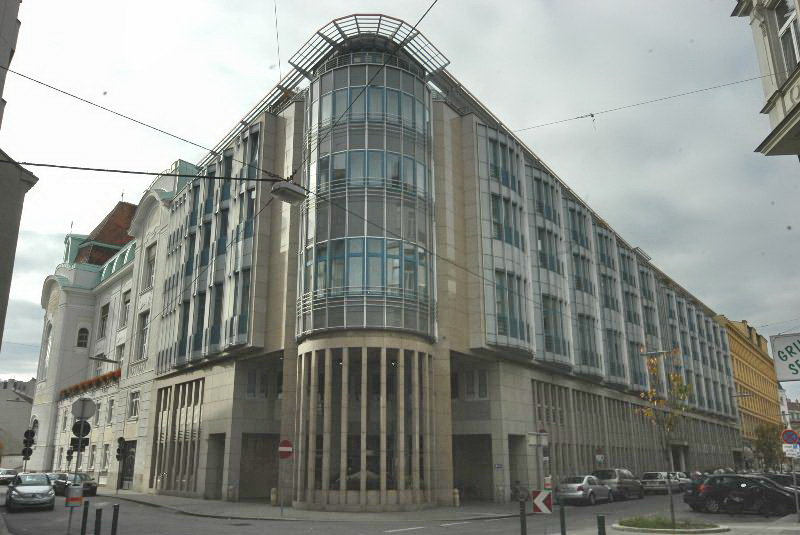 Krankenhaus der Barmherzigen Brüder in Wien-Leopoldstadt